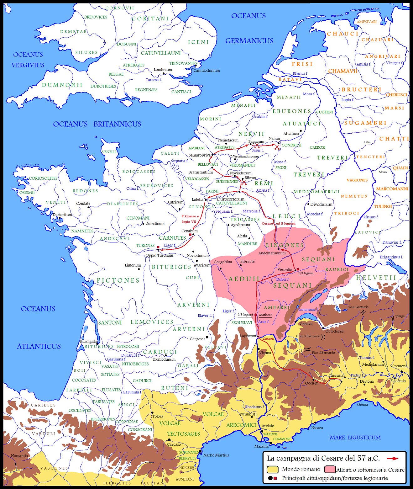 La Gallia nel corso del secondo anno di campagne militari di Cesare